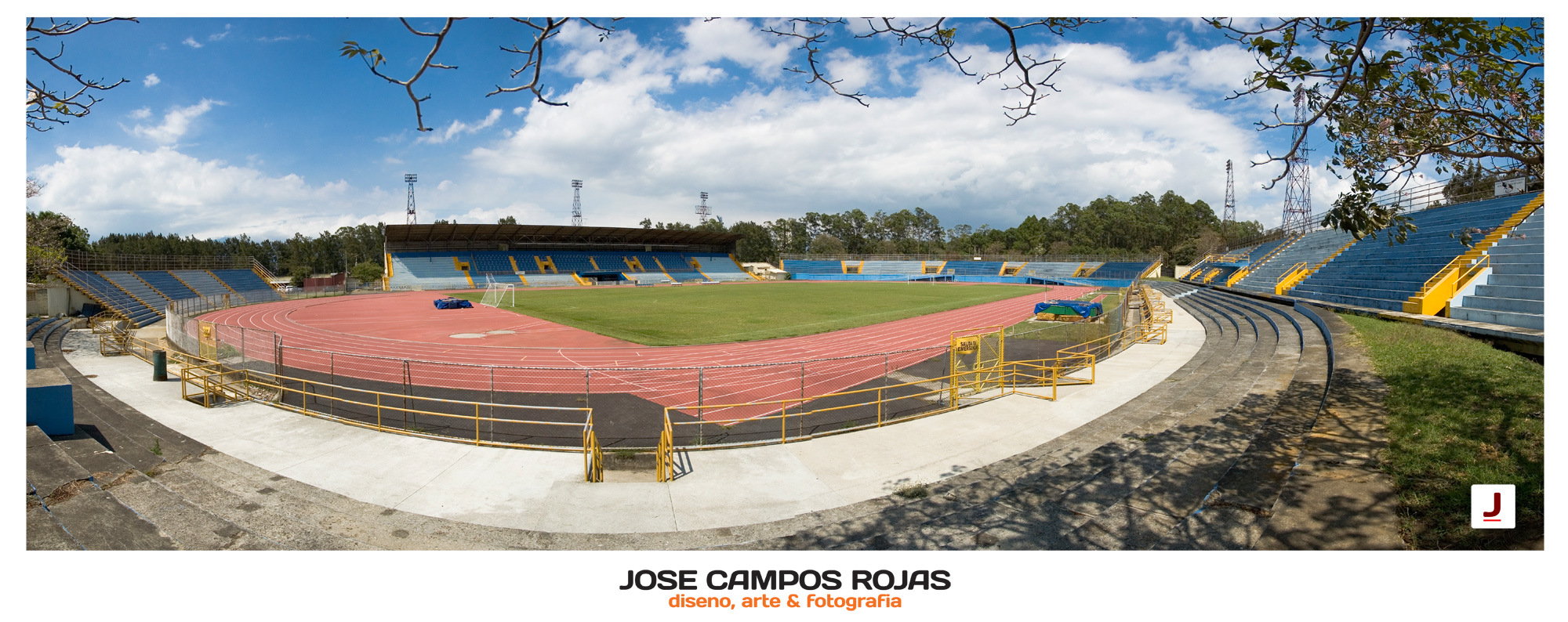 Antiguo Estadio Nacional de Costa Rica en 2009, antes de su demolición para construir el actual recinto.